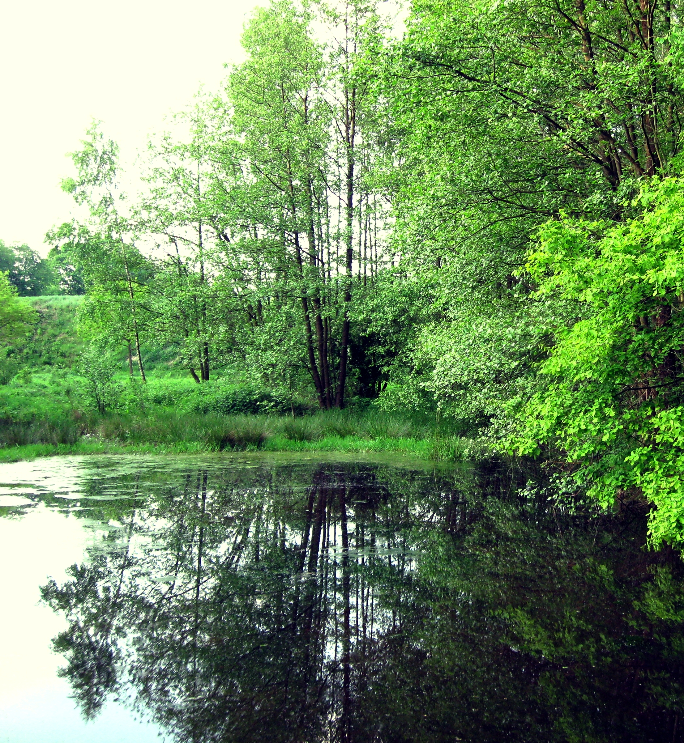 Stillgewässer im Naturschutzgebiet Sandgrube Exter in Vlotho-Exter